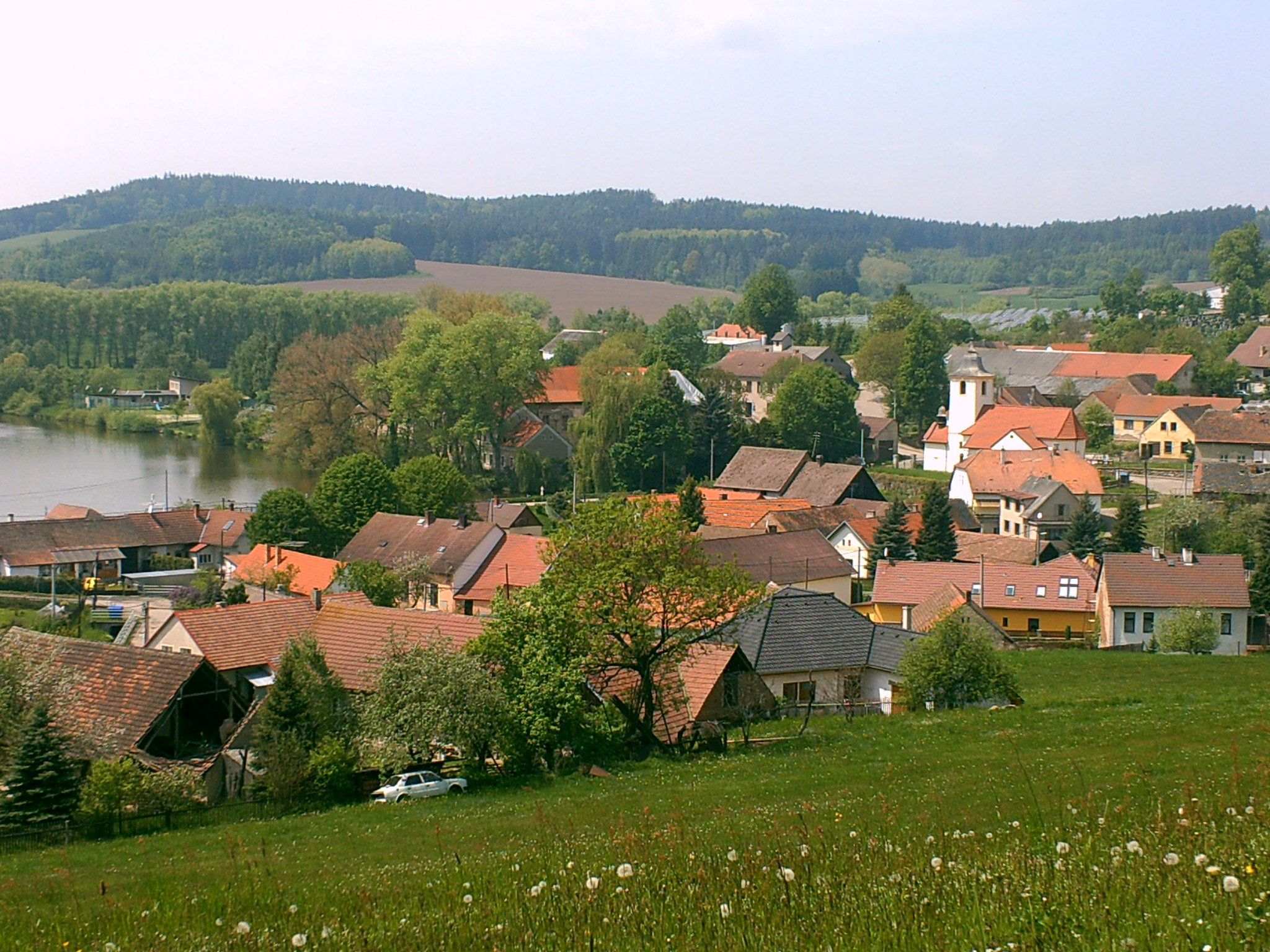 Celkový pohled na obec Popovice